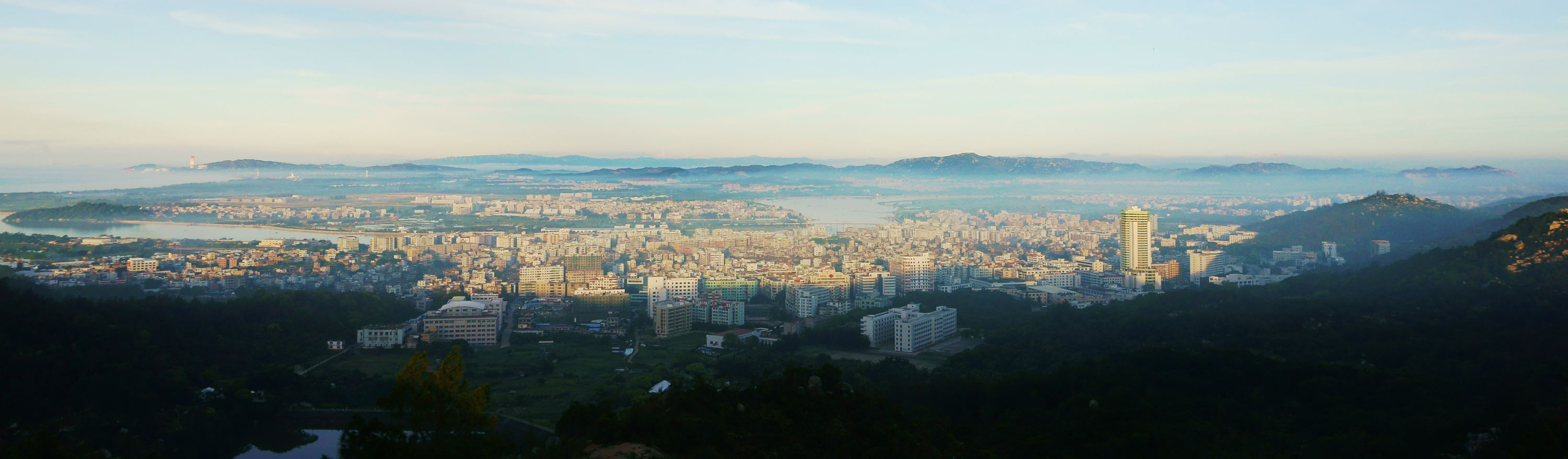 中文（中国大陆）: 达濠小望山望濠城 2013年